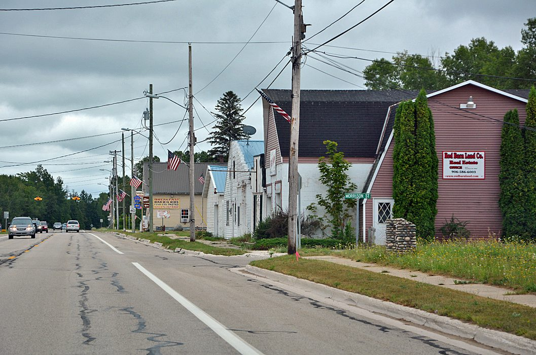 Germfask Township, Michigan